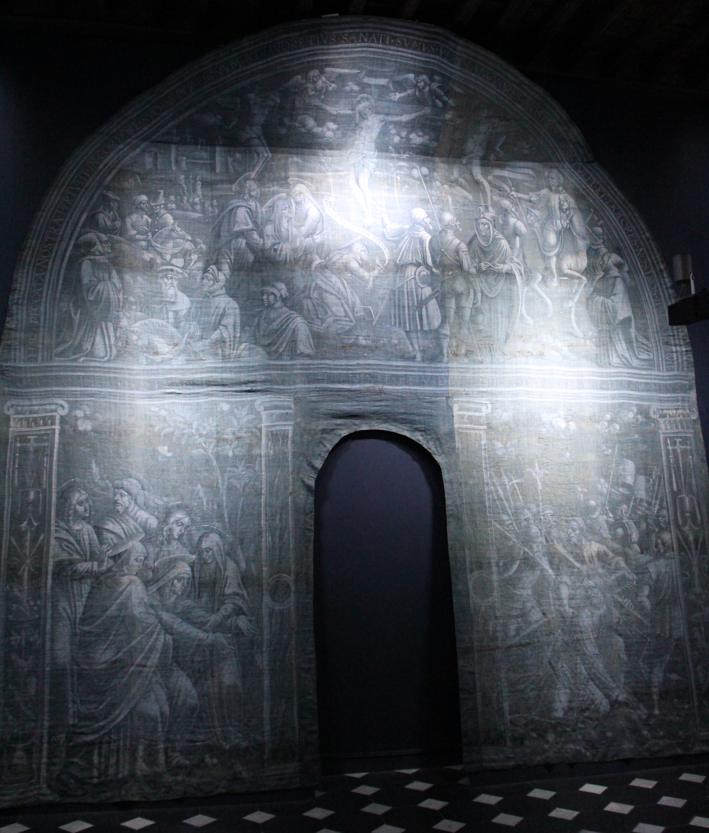 Museo Diocesano (Genoa) The making of this document was supported by Wikimedia CH. (Submit your project!) For all the files concerned, please see the category Supported by Wikimedia CH.